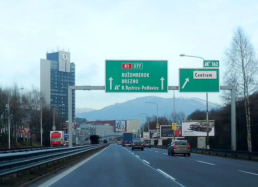 Krajské mesto Banská Bystrica, pohľad z rýchlostnej cesty R-1 pri vjazde od Zvolena.